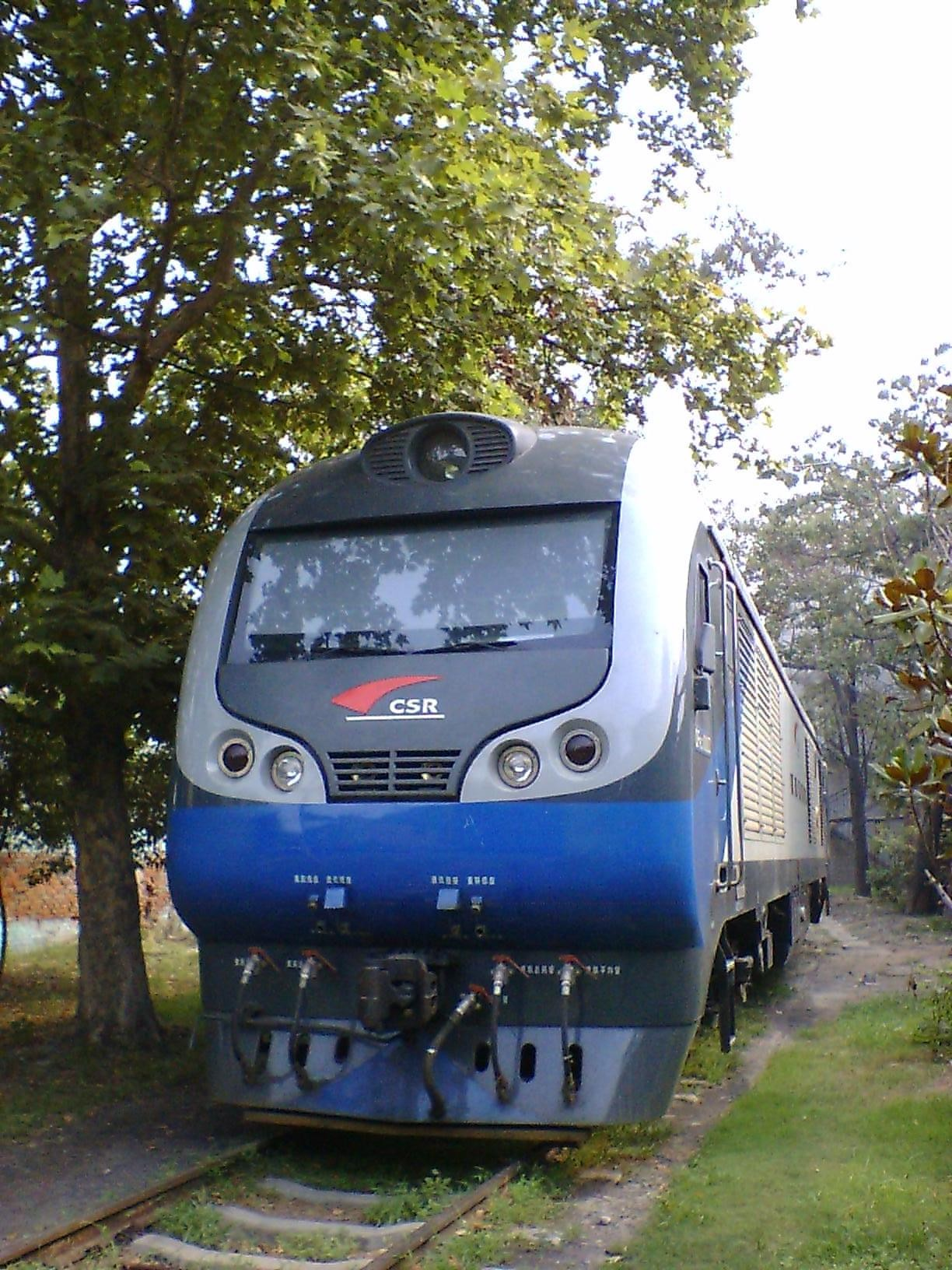 DF8CJ3号车